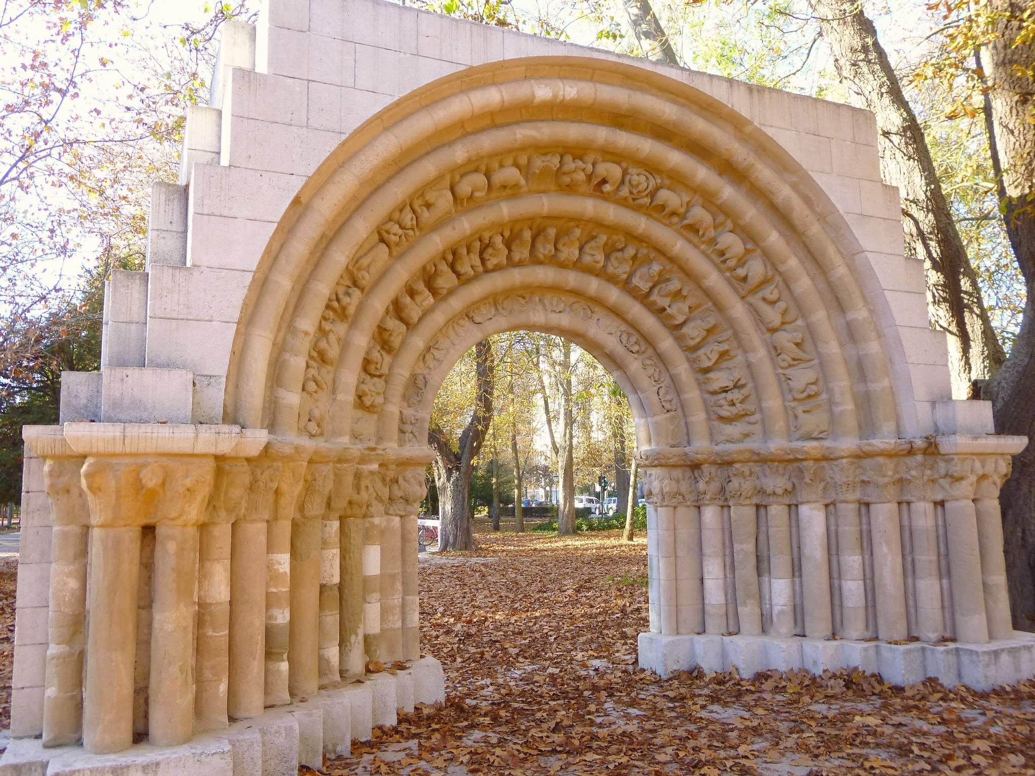 Burgos - Parque de la Isla, portada románica de desaparecida iglesia de Nuestra Señora de la Llana (Cerezo de Río Tirón)